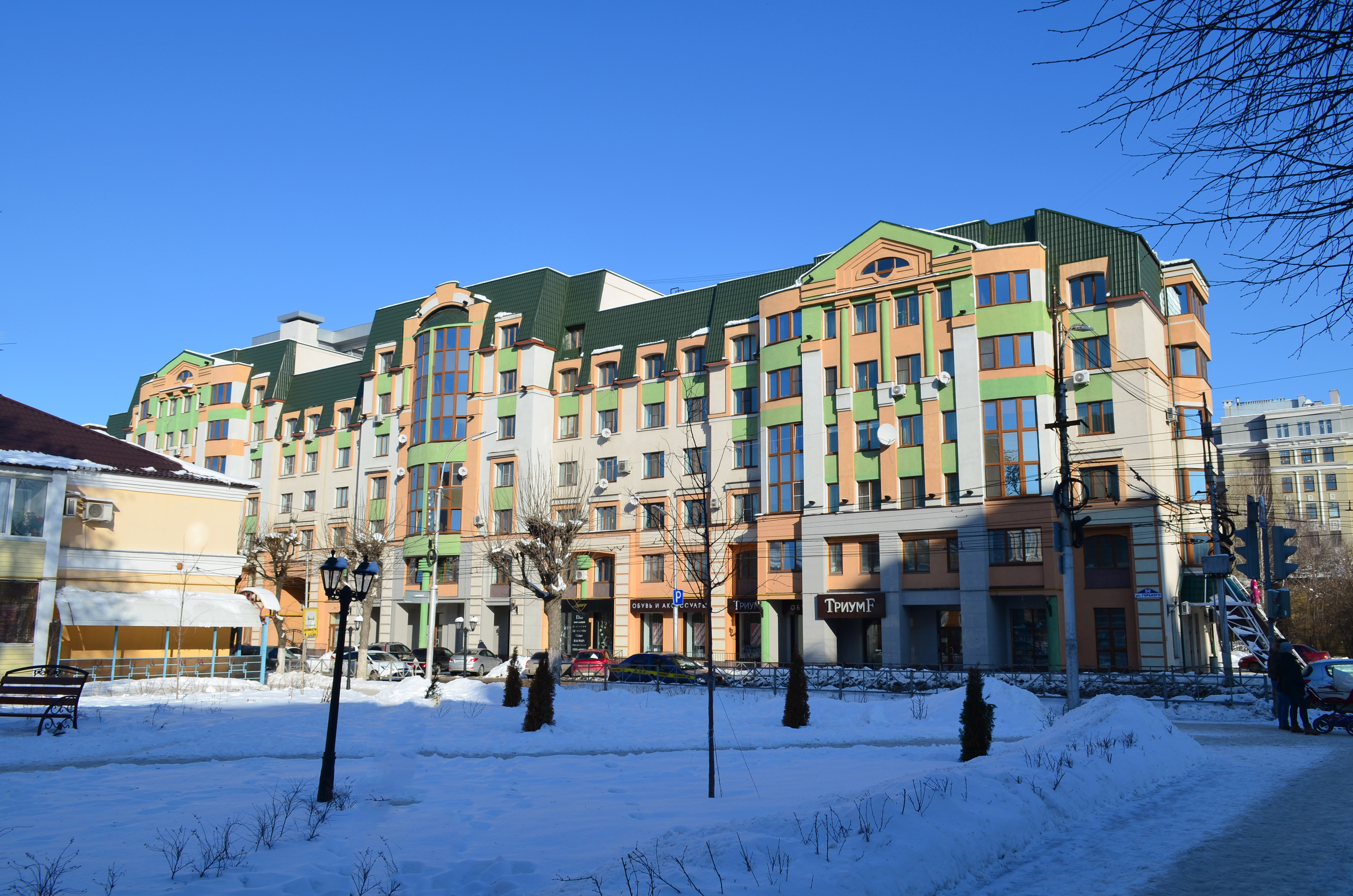 Рязань,ул.Горького,д.50.